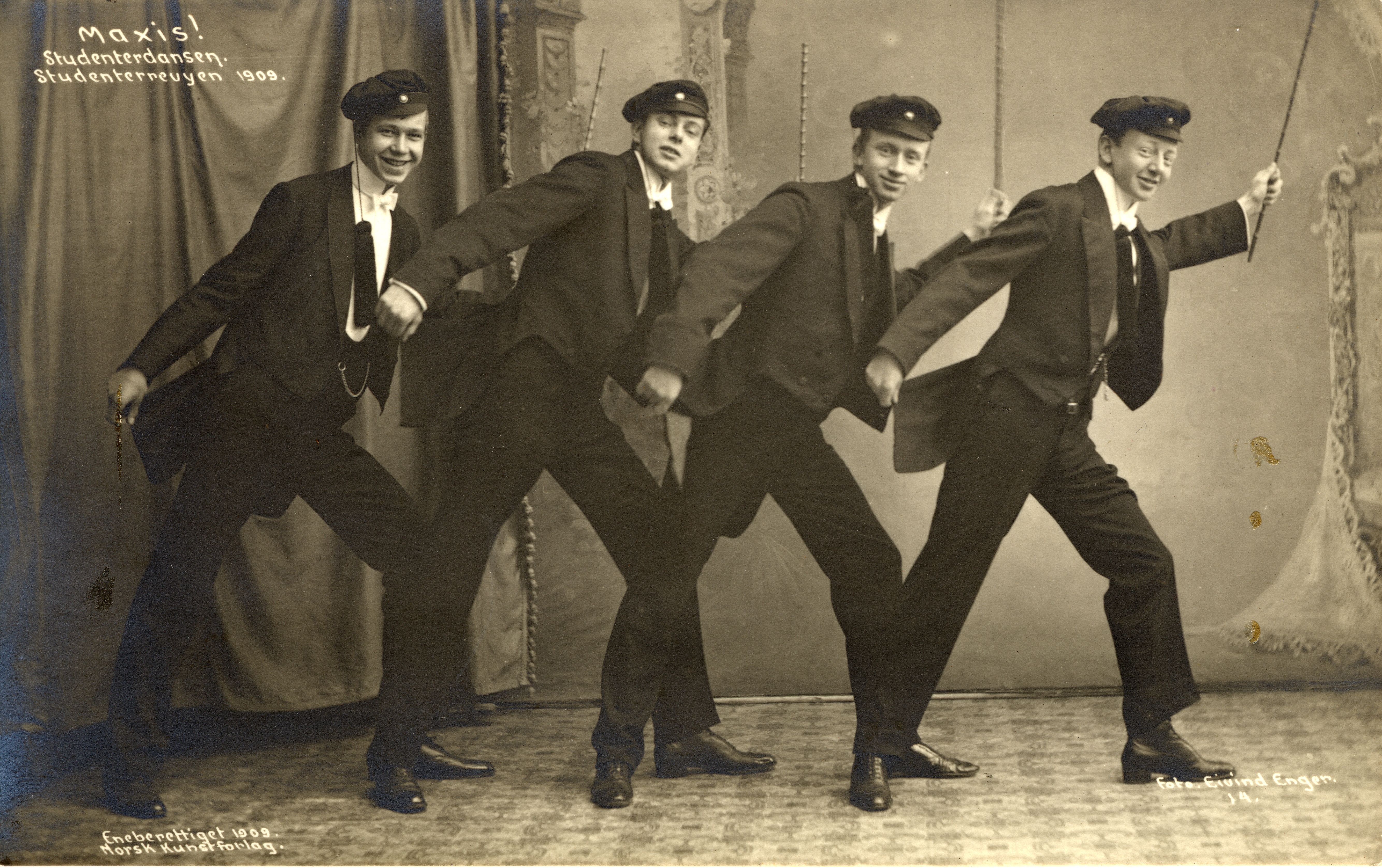 Studenterdansen. Maxis! Studenterrevyen 1909. Foto: Eivind Enger, Norsk Kunstforlag. Arkivref.: Riksarkivet/PA-1322 Det Norske Studentersamfund, Gb, 9.